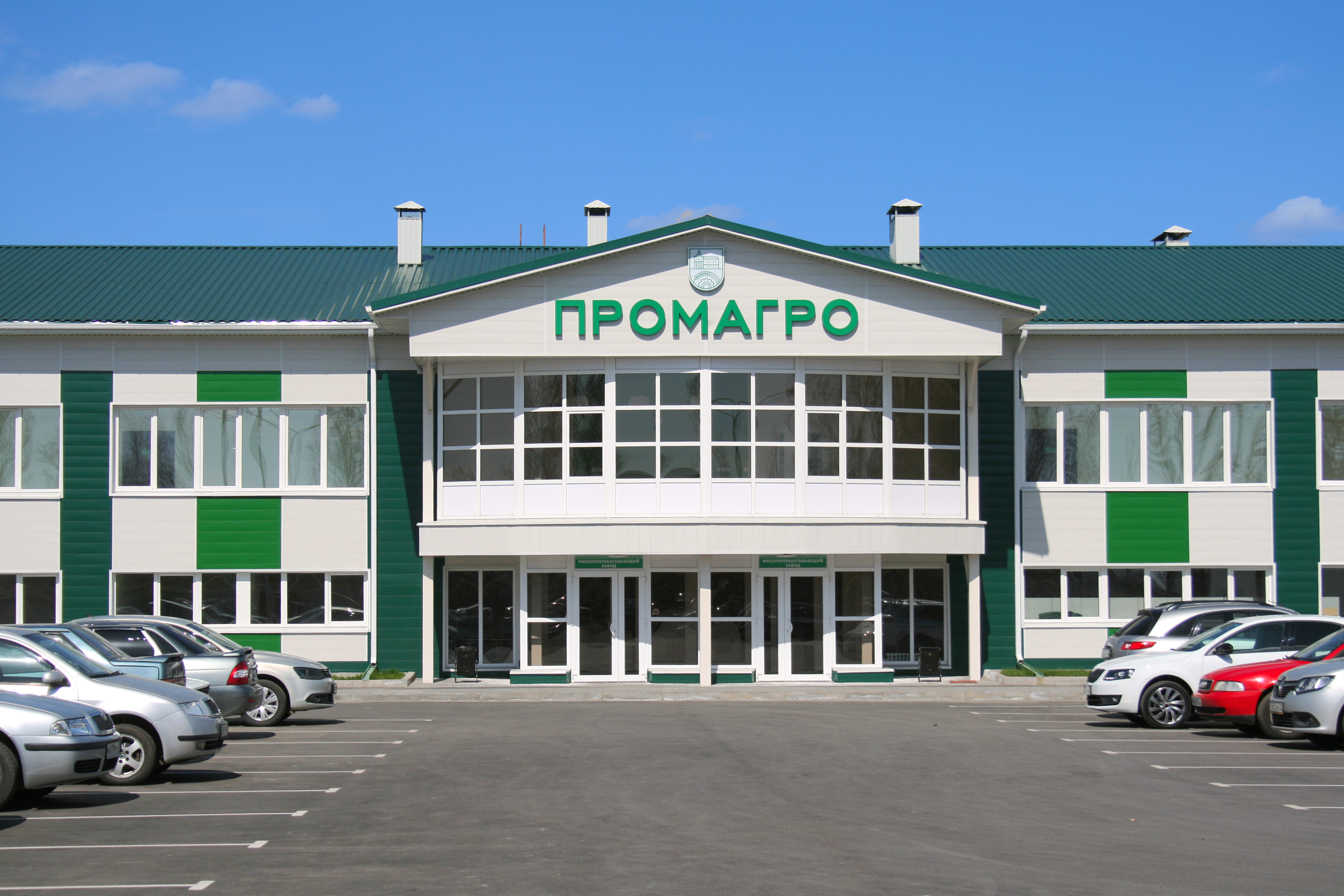 Компания «Промагро», Старый Оскол